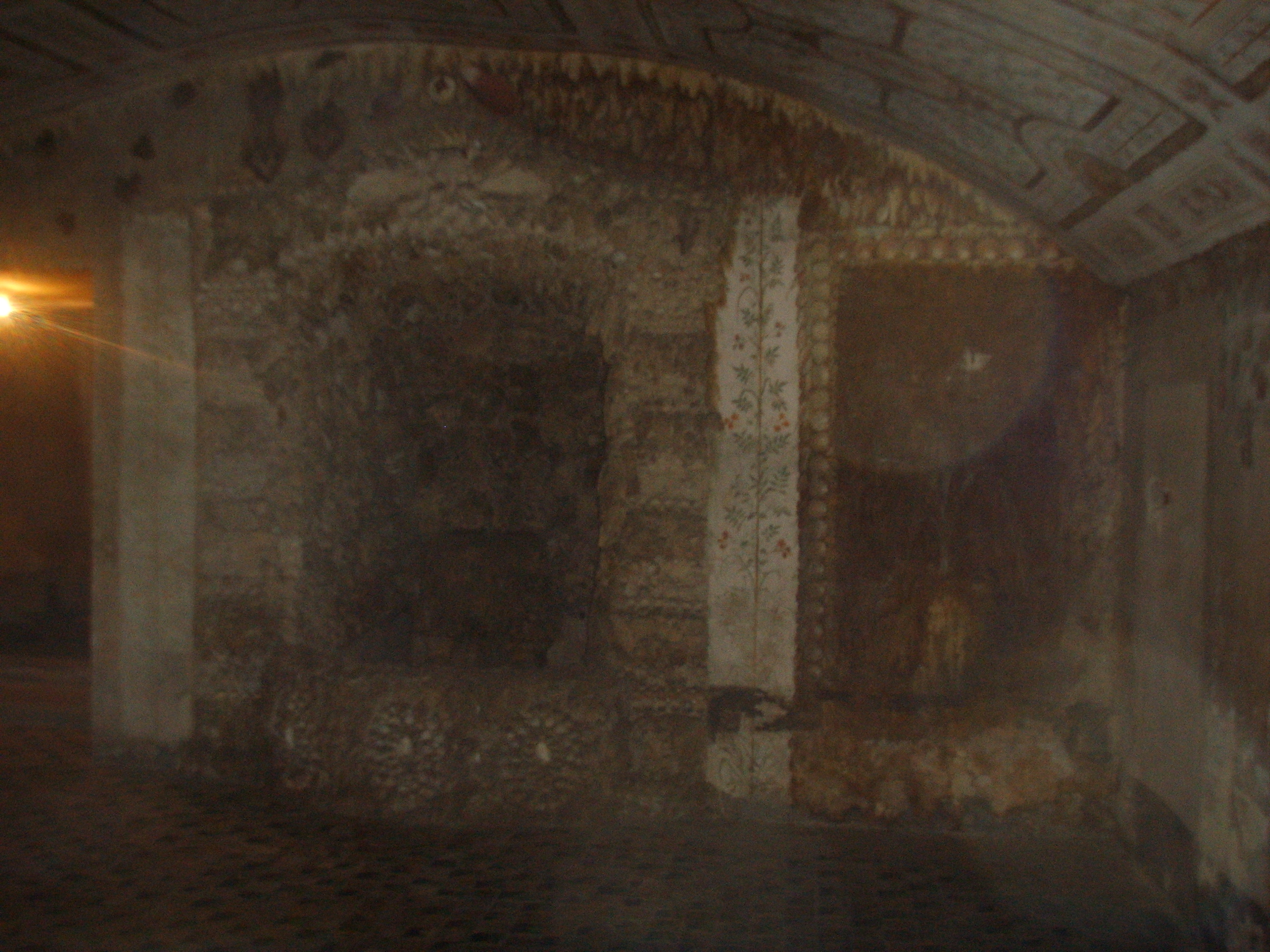 Villa Medicea di Careggi, inside in Florence, Italy